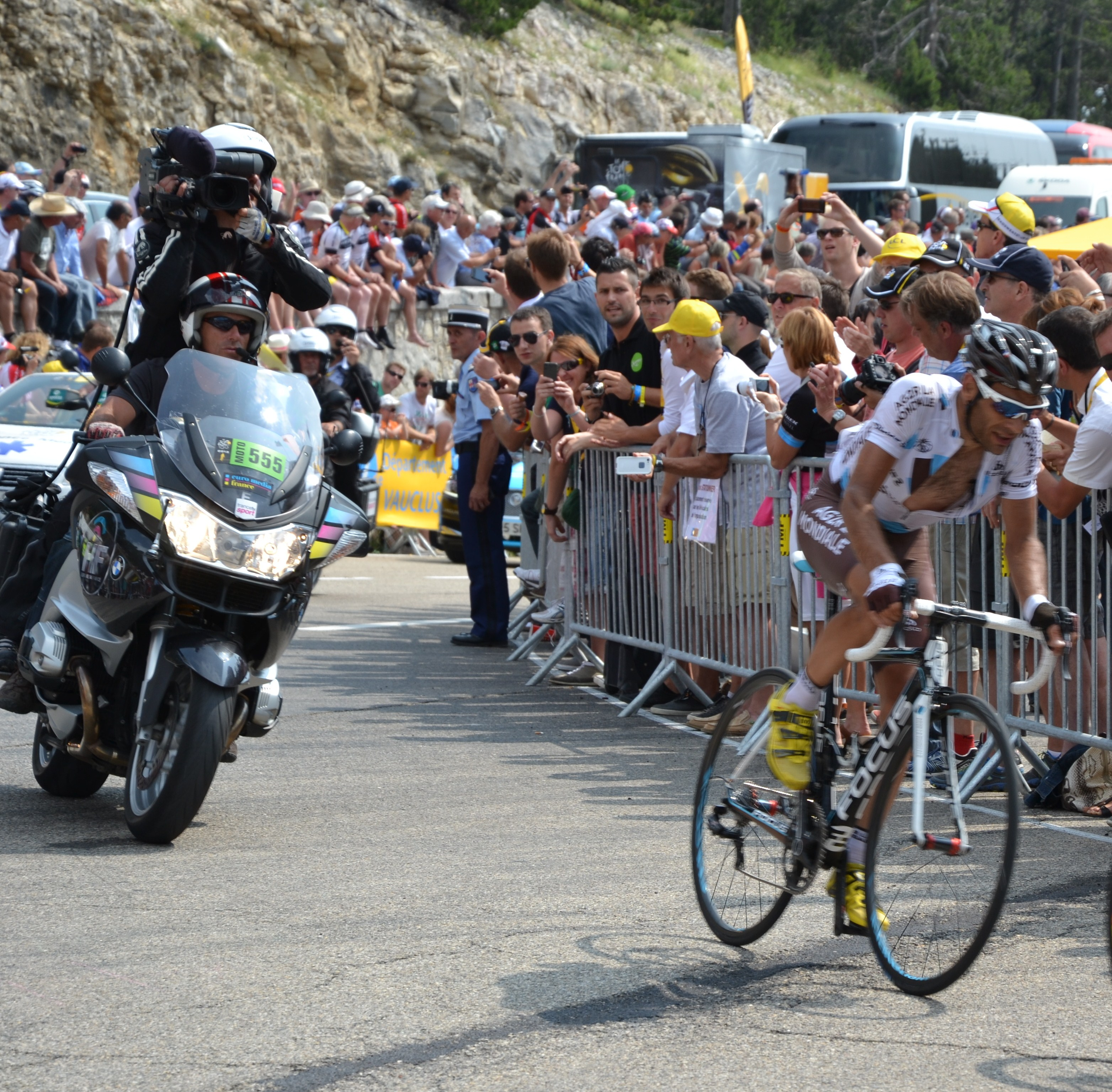 Jean-Christophe Péraud - Etape 15 du Tour de France 2013, au Chalet Reynard (Mont Ventoux)